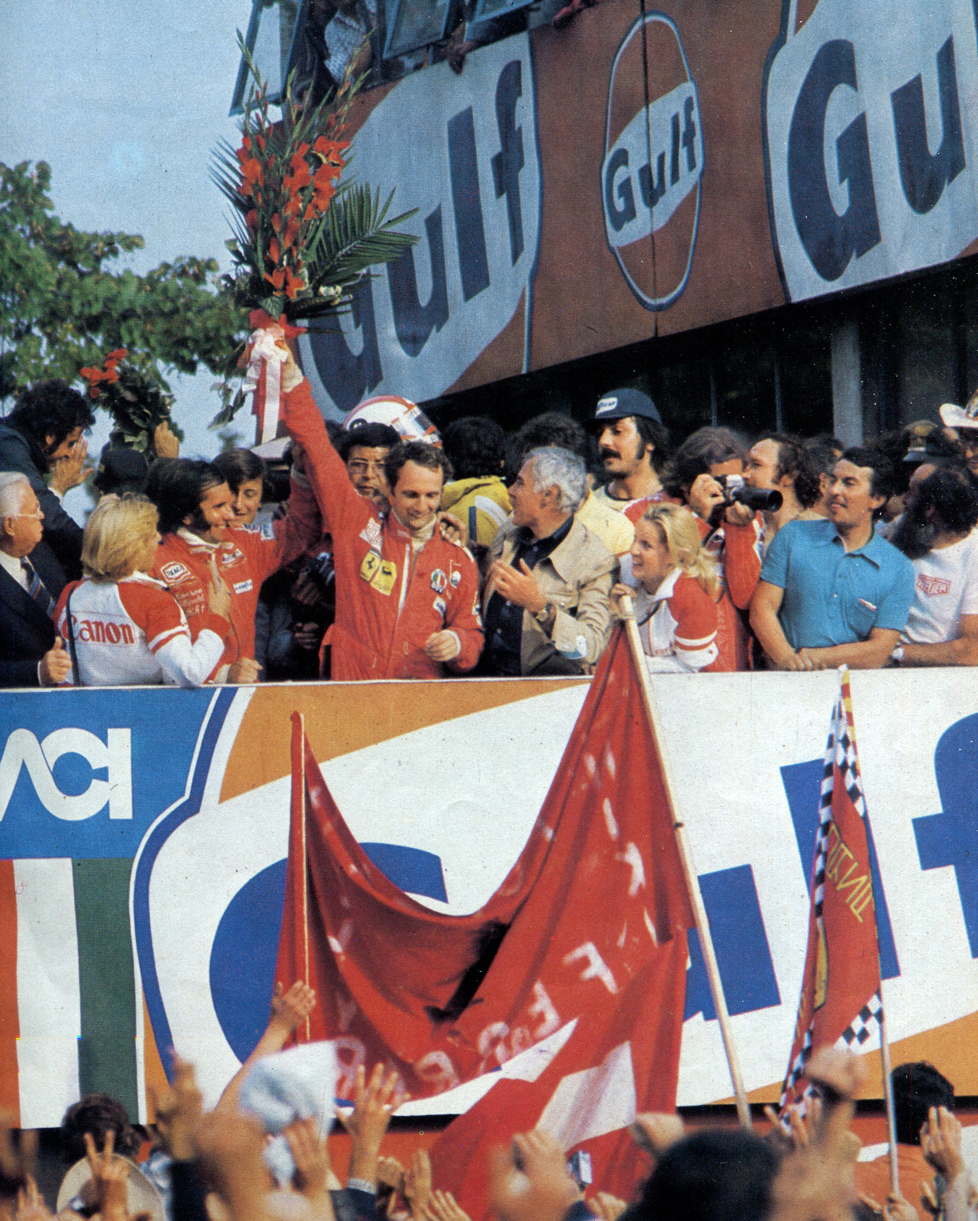 Monza, Autodromo Nazionale, 7 settembre 1975. XLVI Gran Premio d'Italia. Grazie al terzo posto raggiunto a fine corsa, il pilota della Scuderia Ferrari, l'austriaco Niki Lauda, viene festeggiato sul podio quale nuovo campione del mondo di Formula 1; alla sua destra, gli rende omaggio il campione uscente, il brasiliano Emerson Fittipaldi della McLaren, nell'occasione secondo sul podio.Original caption: "Dopo il vincitore, è la volta sul podio di Monza dei protagonisti del Mondiale '75, il vincitore Lauda ed il campione uscente Fittipaldi. Gli applausi per il neo-campione mondiale sono stati un poco più blandi, forse perché la gente si era già "scaricata" con Regazzoni [...]."